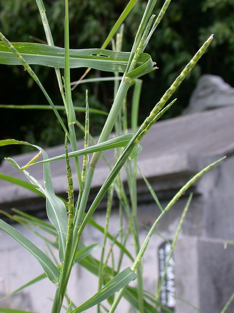 ツノアイアシ：Rottbellia cochinchinensis 沖縄本島中部恩納村 2006.08.11